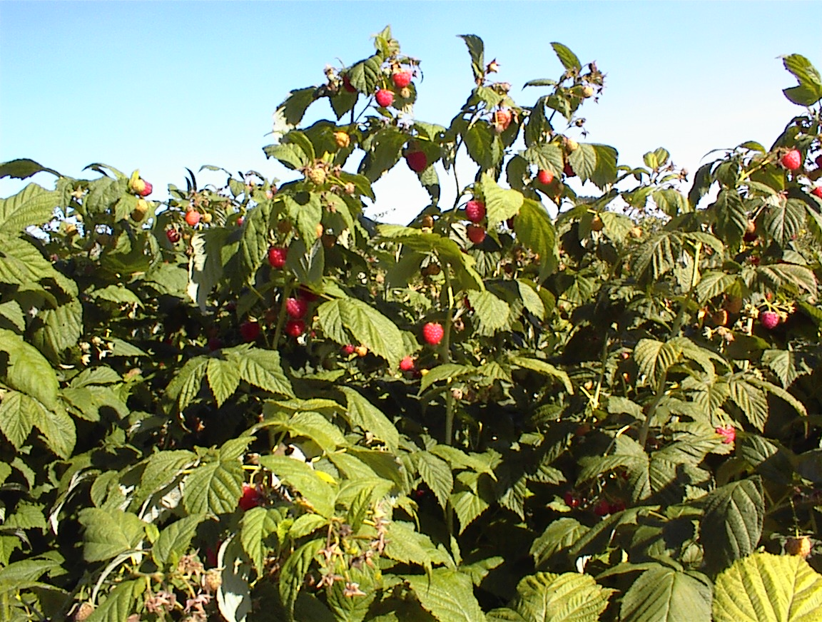 Foto pflückreifer Himbeeren von einer Himbeerplantage in Mittelfranken